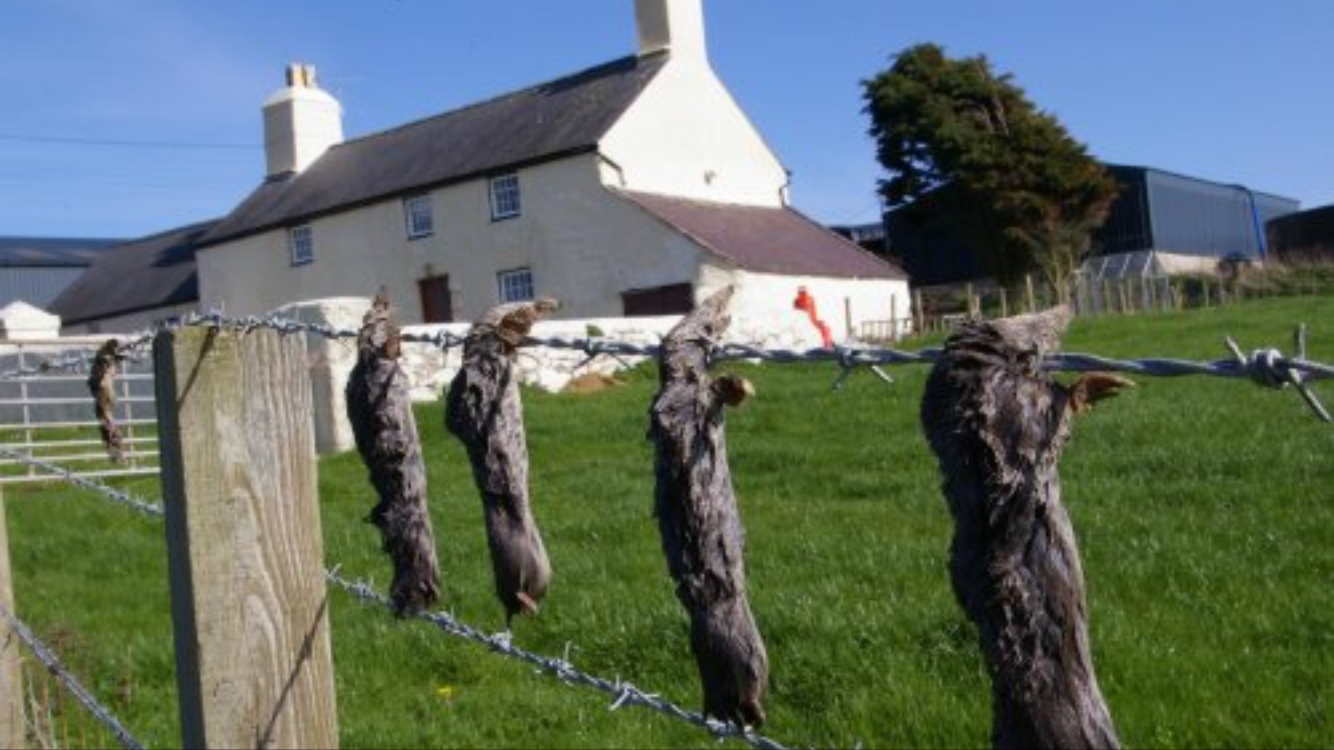 Crogbren o gyrff tyrchod - arfer ffermwyr i arddangos faint o dyrchod a laddwyd.